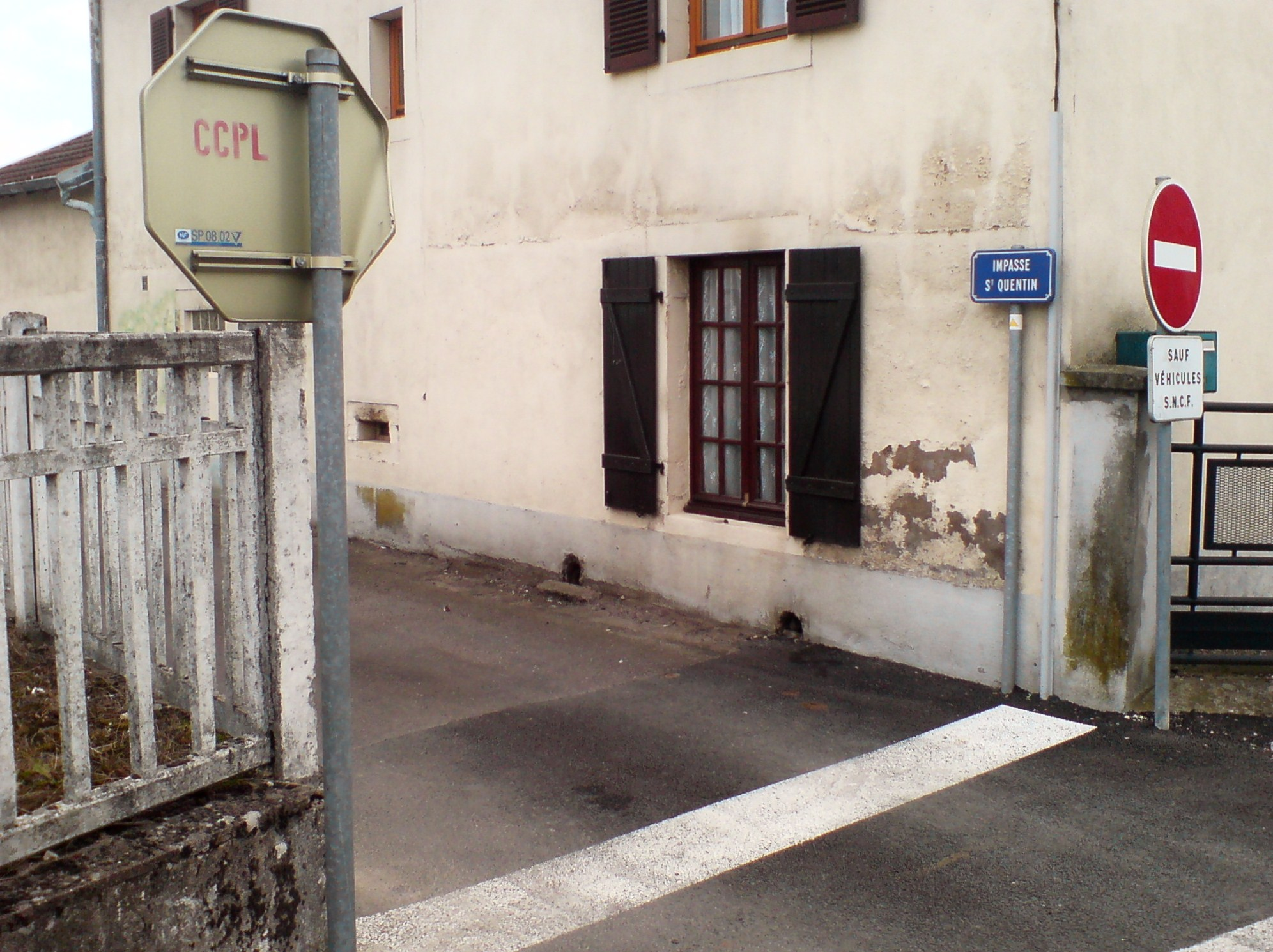 Curiosité locale, une impasse à sens unique. Le panonceau de rue indique l'impasse, la stop fait la largeur de la rue, et le panneau est face opposée.